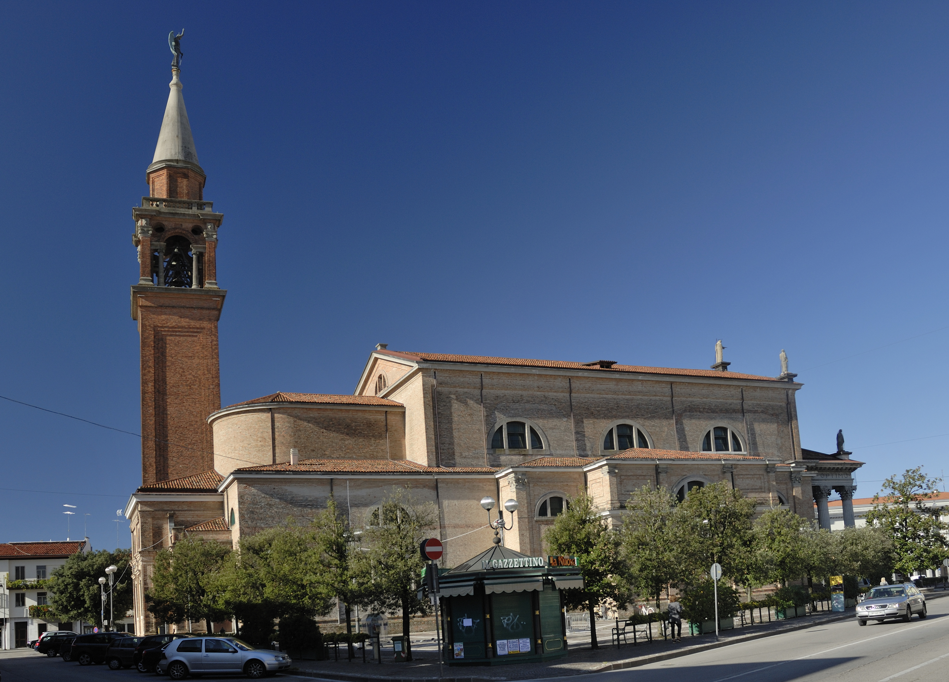 Il Duomo di San Donà di Piave, Veneto